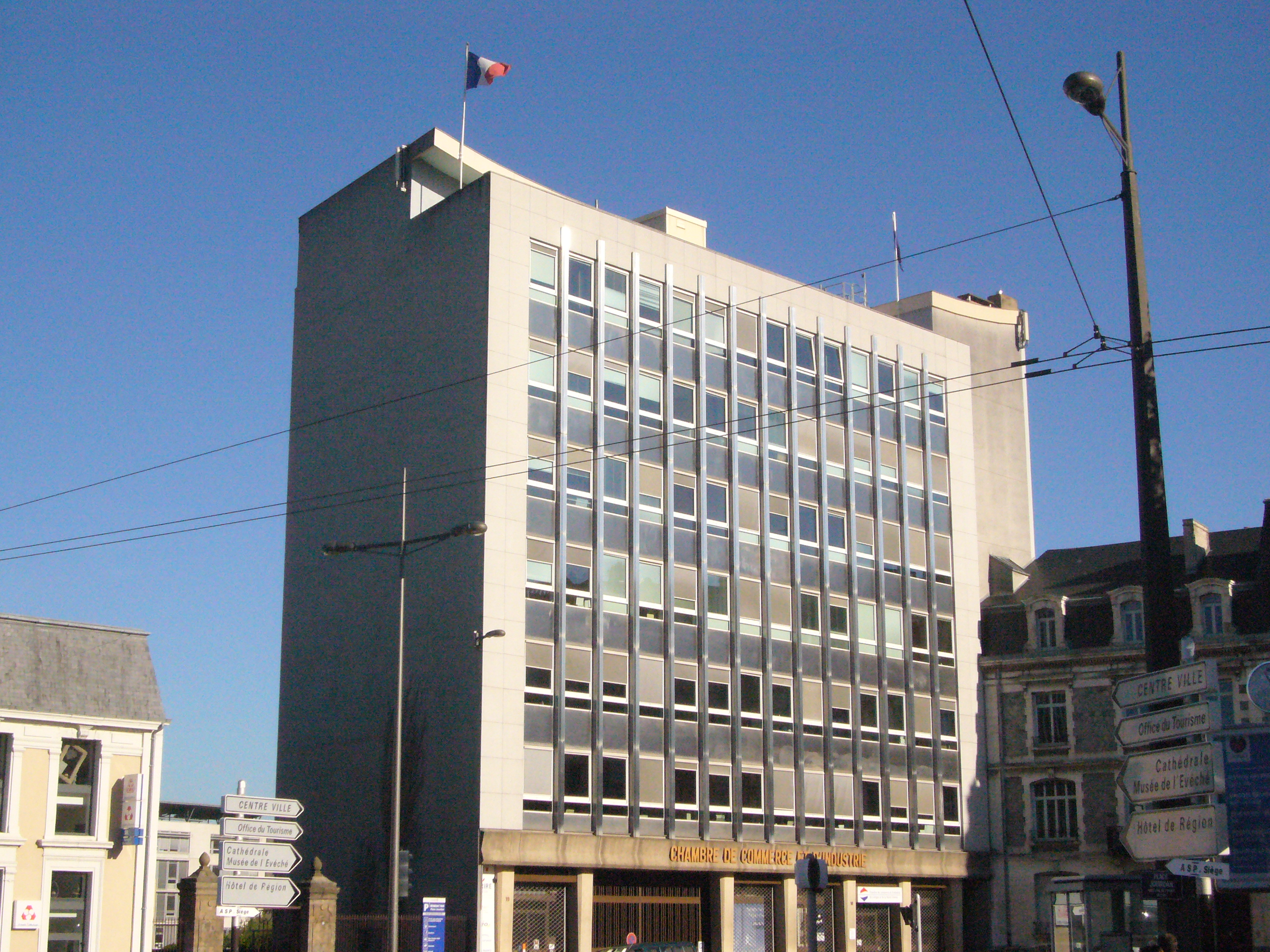 Immeuble de la Chambre de Commerce et d'Industrie de Limoges et de la Haute-Vienne